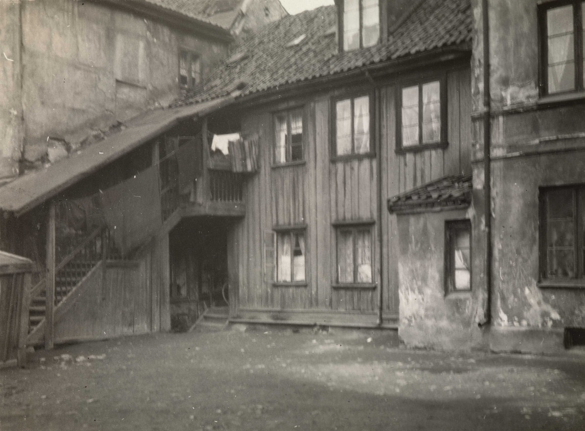 Vinkelgaten 12. Foto: N. Engstrøm/Oslo Museum, ca. 1910-20.